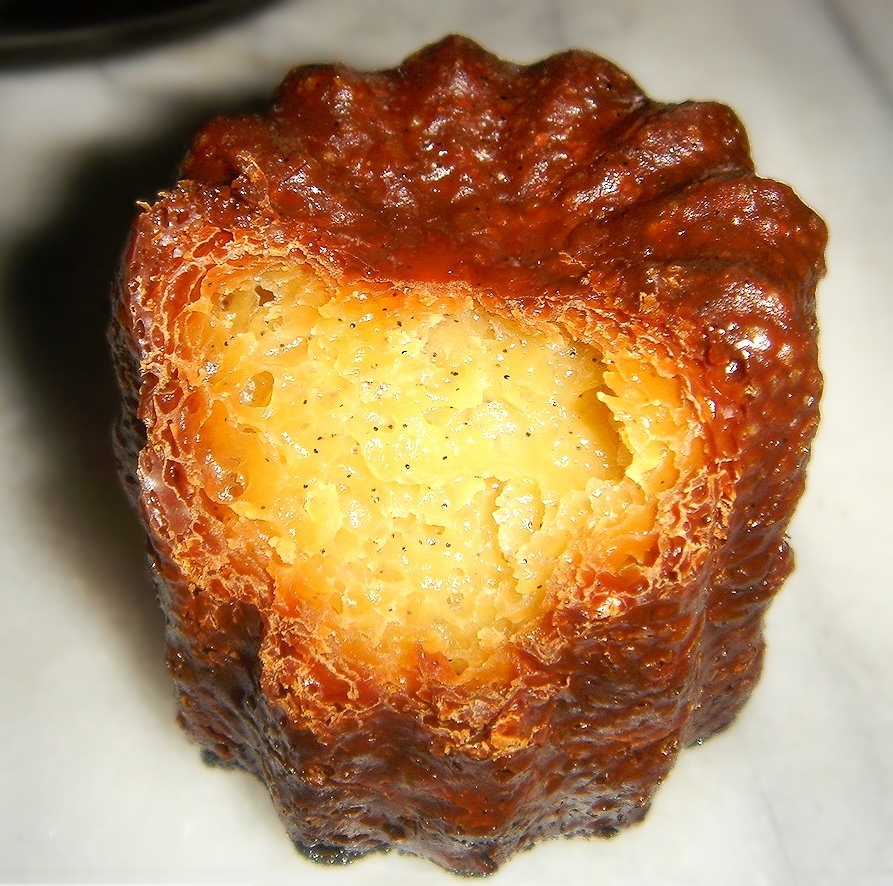 Ein Canelé, Gebäckspezialität aus Bordeaux. Die Kruste ist karamelisiert, im Inneren ist die Verwendung von Vanille erkennbar.